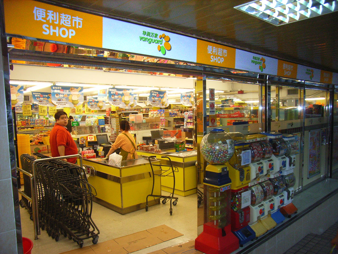 中文（香港）: 北角zh:炮台山, 炮台山道華潤萬家超級市場